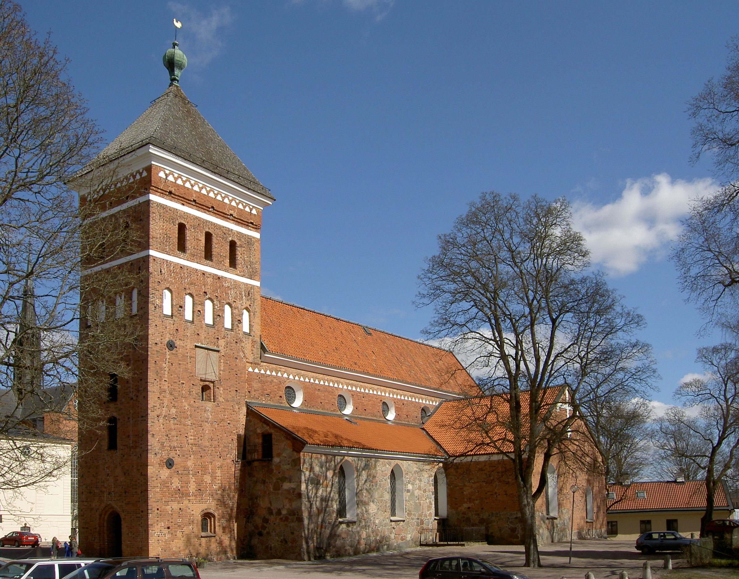 Helga Trefaldighets kyrka